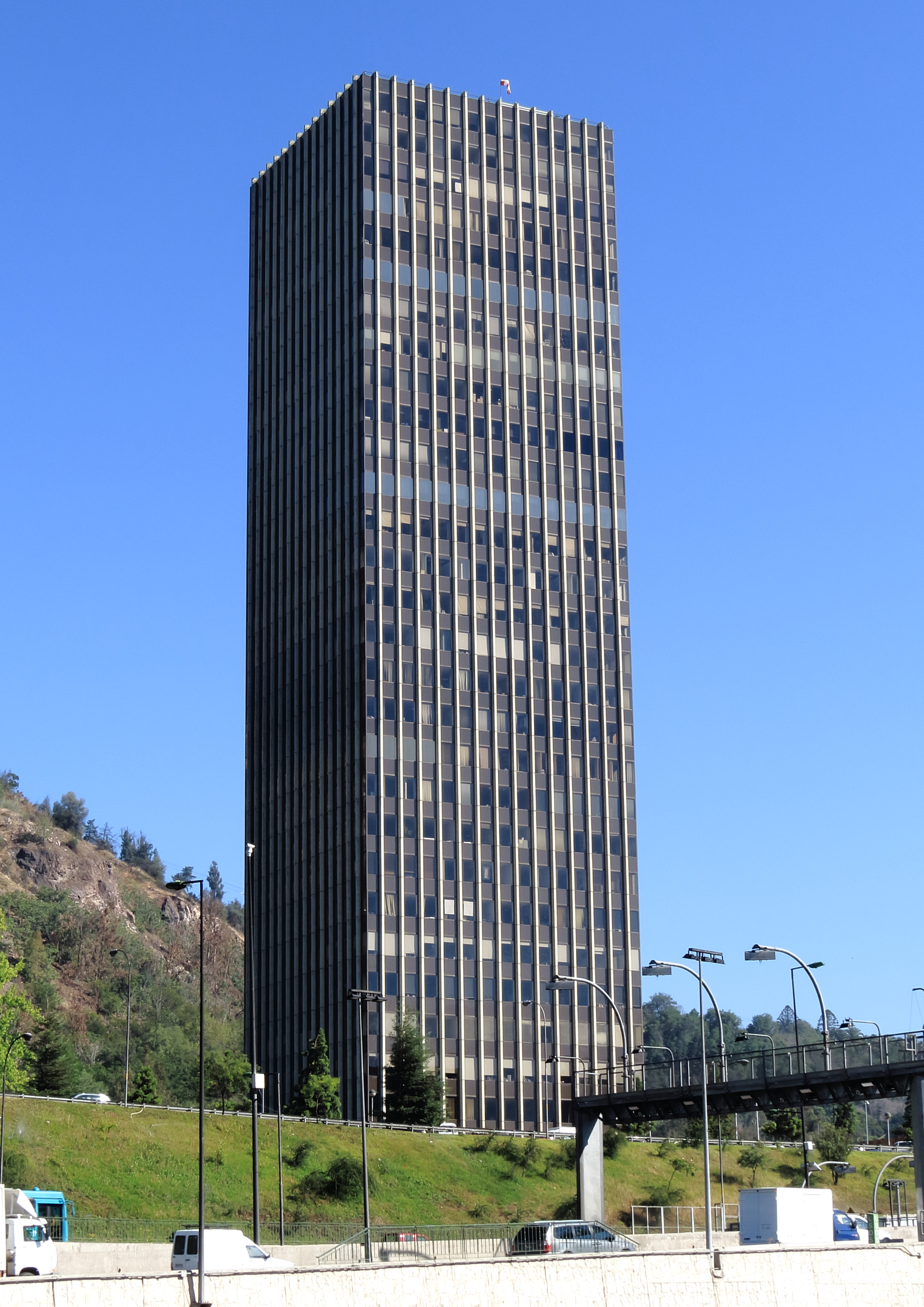 Fotografia de la Torre Santa Maria, conocida por su incendio en 1981